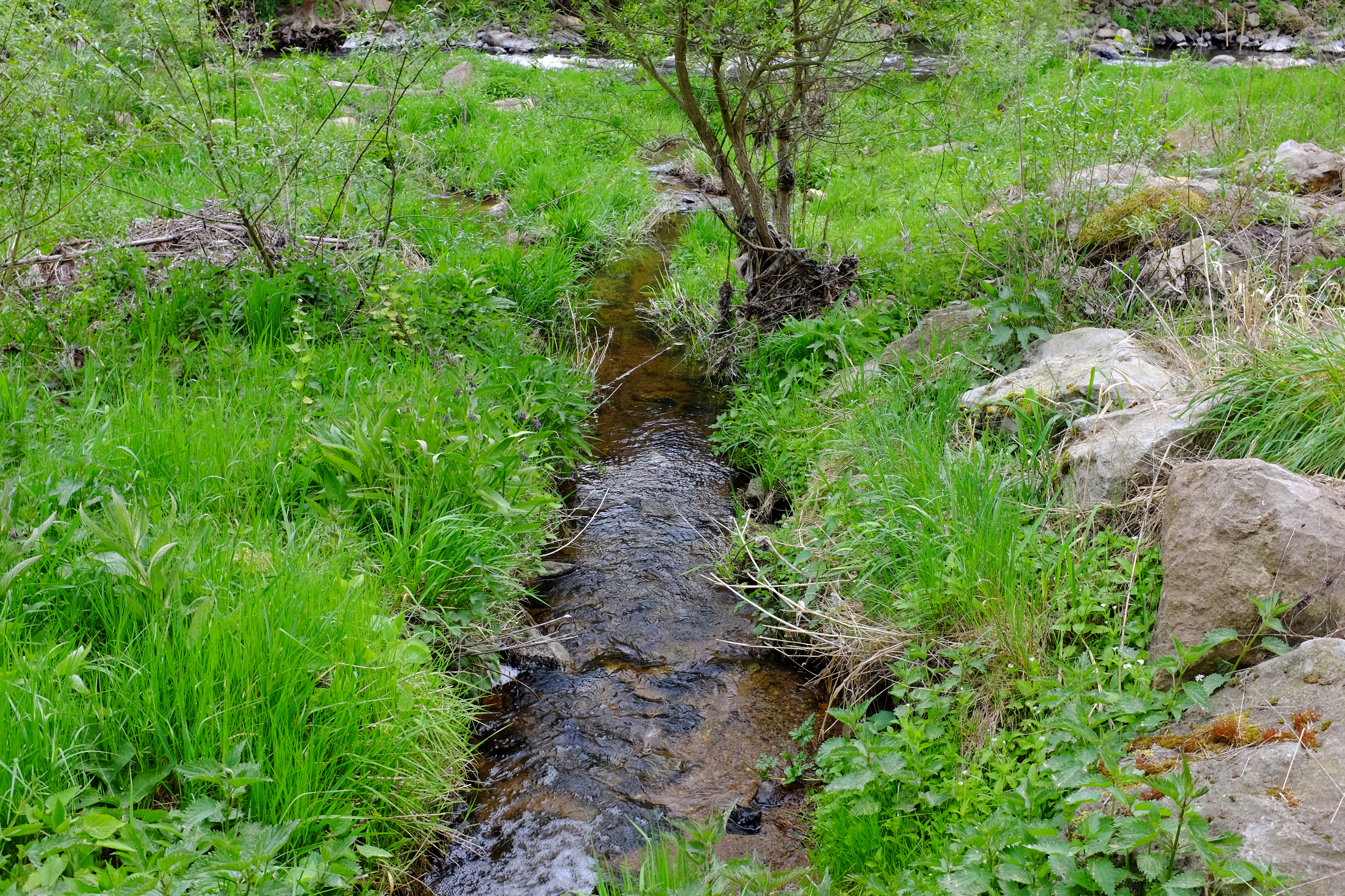 Vratský potok, přítok Ohře, u soutoku s Ohří, okres Karlovy Vary